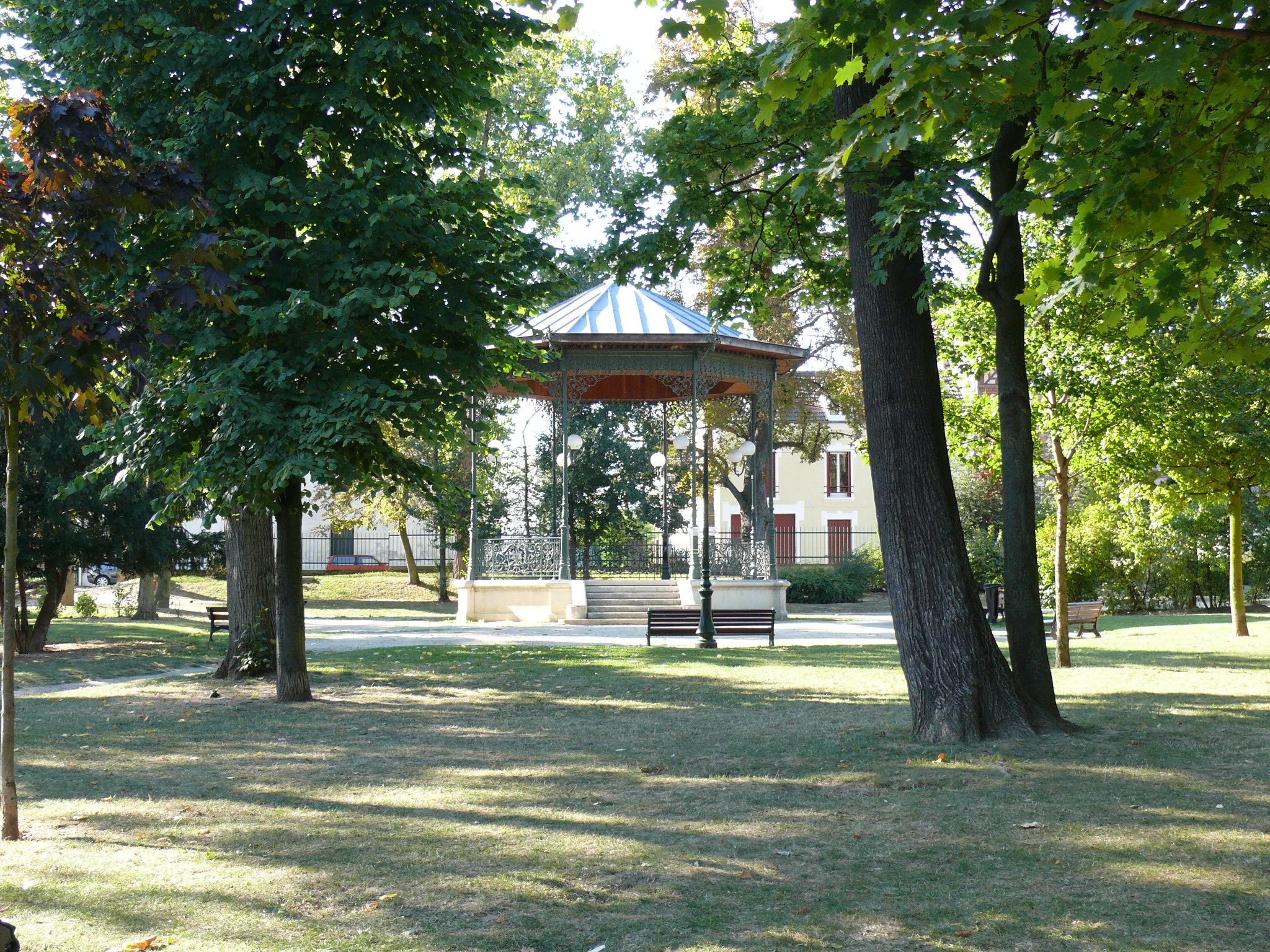 Montmagny (Val-d'Oise - Île-de-France - France) : Parc de la Mairie